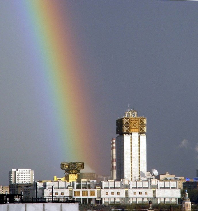 Здание ФАНО в Москве. Бывший Президиум АН СССР, РАН